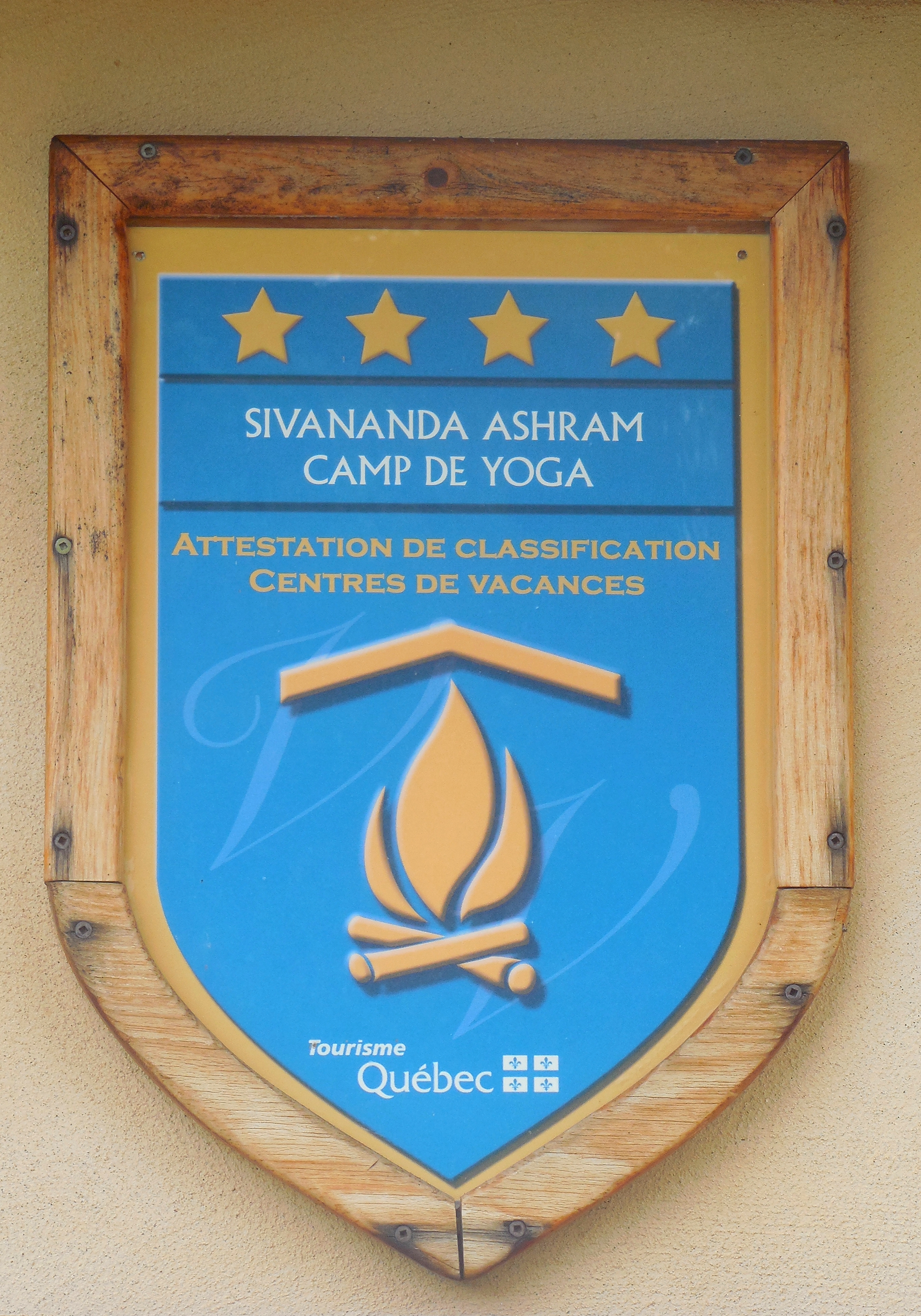 SivanandaCampQCsign_20151005